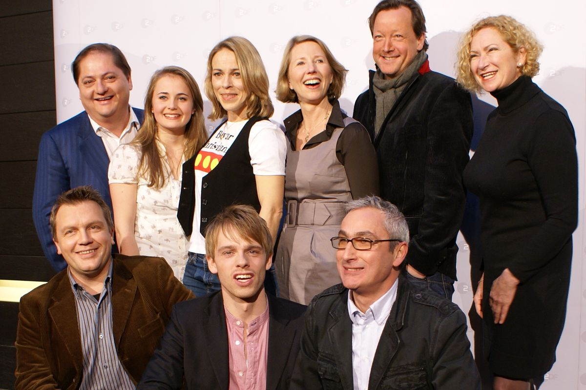 Die Besetzung von "Ein Mann ein Fjord" bei der Premiere in Berlin: Jürgen Tarrach, Olga von Luckwald, Anneke Kim Sarnau, Petra Zieser, Matthias Brandt, Gabi Decker, Hape Kerkeling, Mads Hjulmand und Angelo Colagrossi